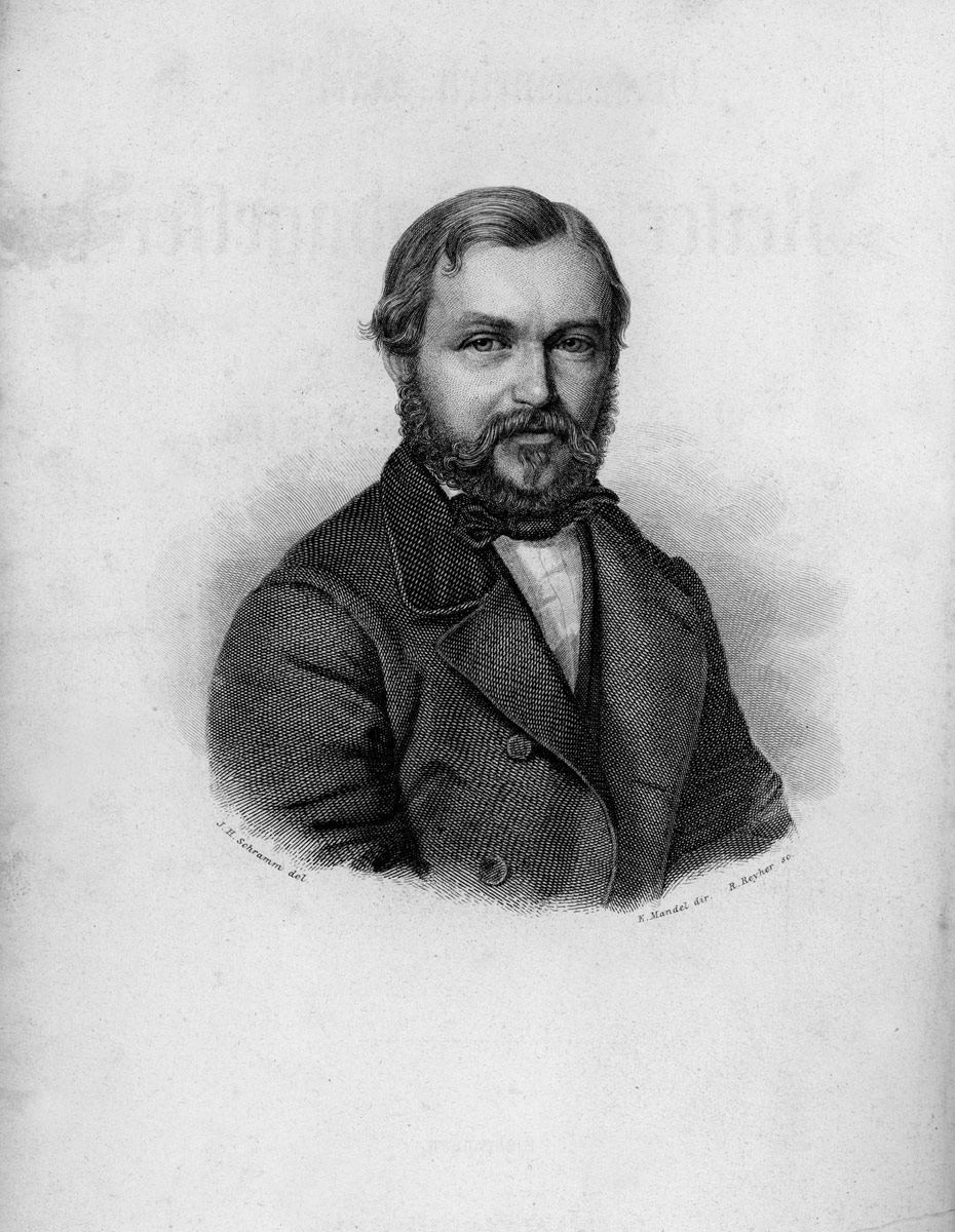 Heinrich Barth, aus: Reiser og Opdagesser i Nord- og Mellem-Afrika, Kopenhagen 1860